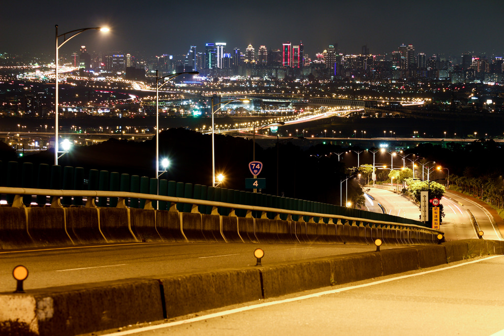 中文（台灣）: 台74甲 望向七期